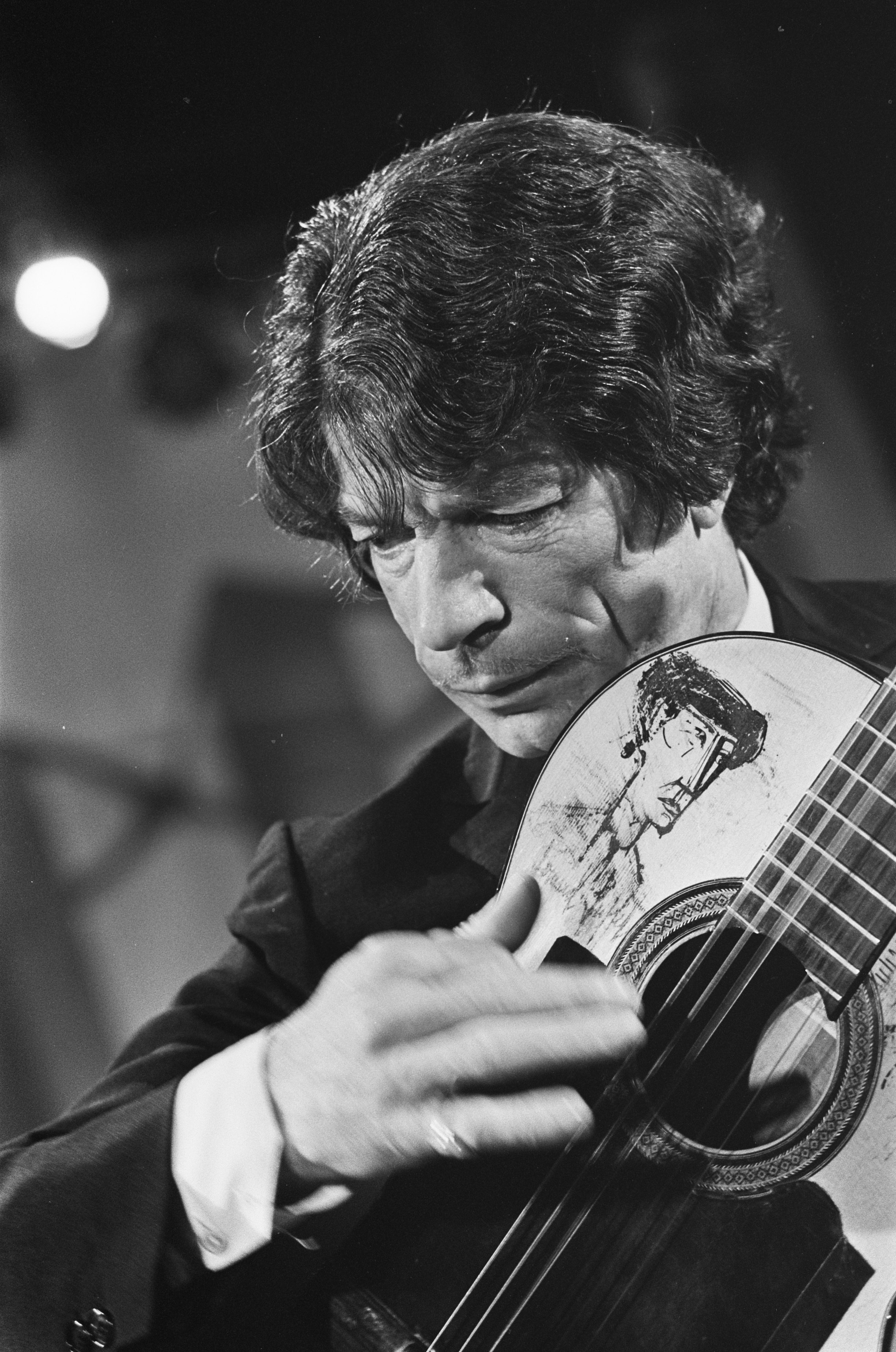 Collectie / Archief : Fotocollectie Anefo Reportage / Serie : Grand Gala du Disque 1968 Beschrijving : Grand Gala du Disque in de RAI. Gitarist Manitas de Platas uit Spanje Datum : 7 maart 1968 Locatie : Amsterdam Trefwoorden : gitaristen Instellingsnaam : RAI Fotograaf : Nijs, Jac. de / Anefo Auteursrechthebbende : Nationaal Archief Materiaalsoort : Negatief (zwart/wit) Nummer archiefinventaris : bekijk toegang 2.24.01.05 Bestanddeelnummer : 921-1451